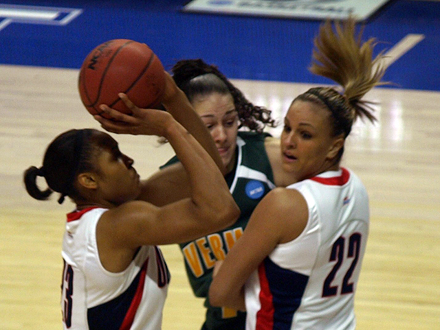 La joueuse de basket-ball des Huskies du Connecticut Maya Moore (23) au tir